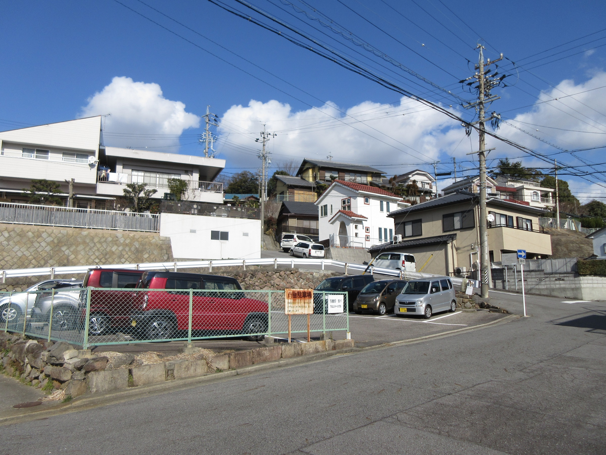 岡崎市六供本町